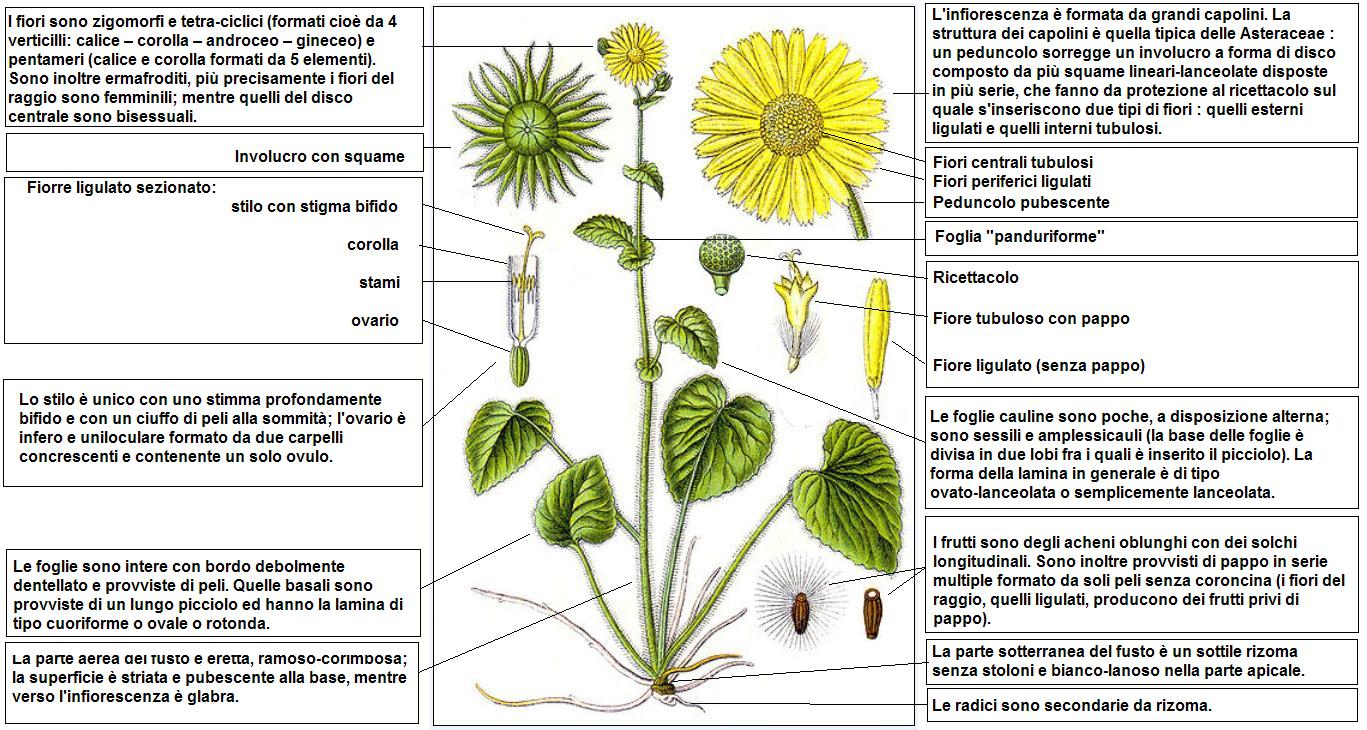 Doronicum pardalianches - DESC Sturm